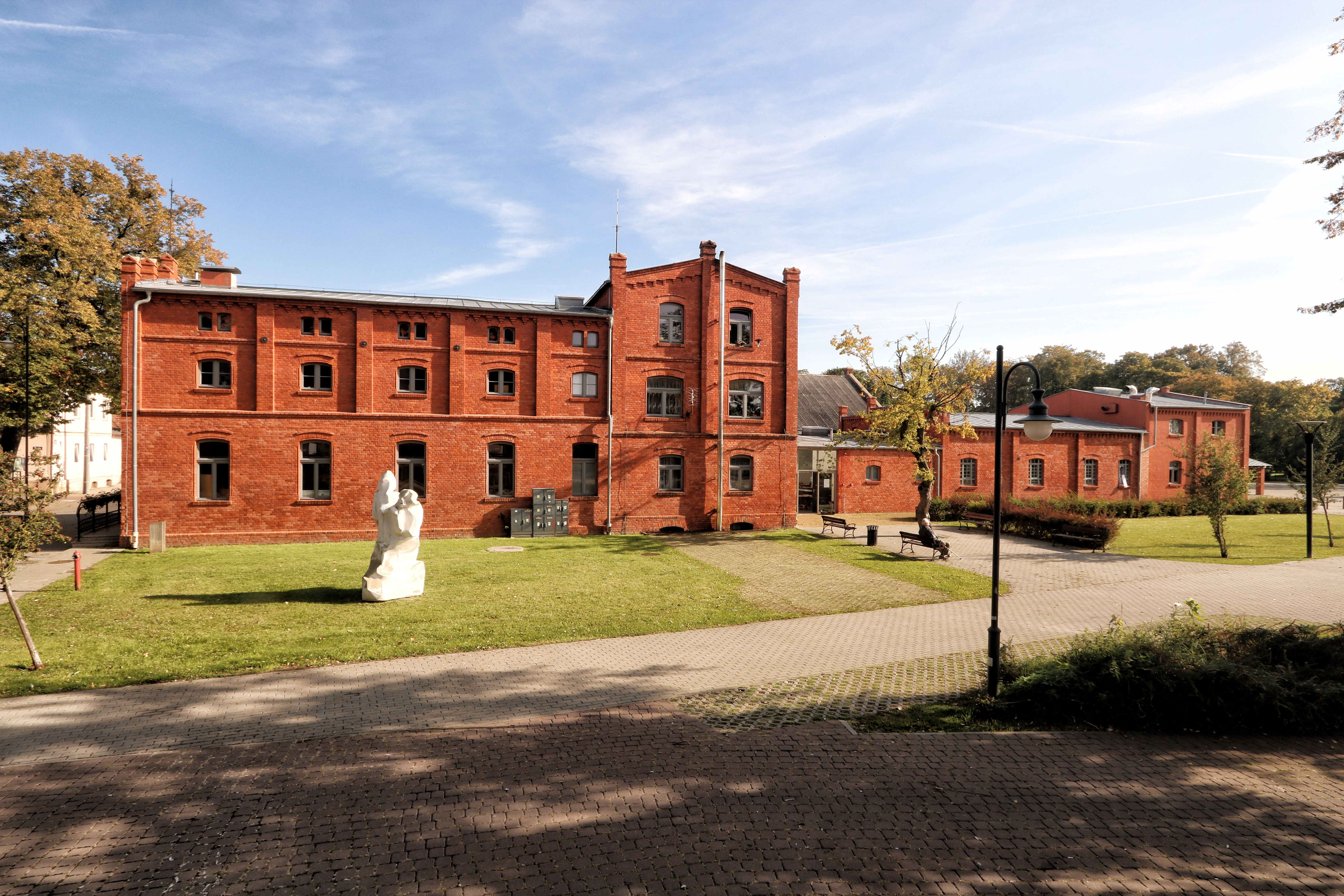 Nowy Dwór Gdański, ul. Mikołaja Kopernika 15-17 - magazyn, 1902